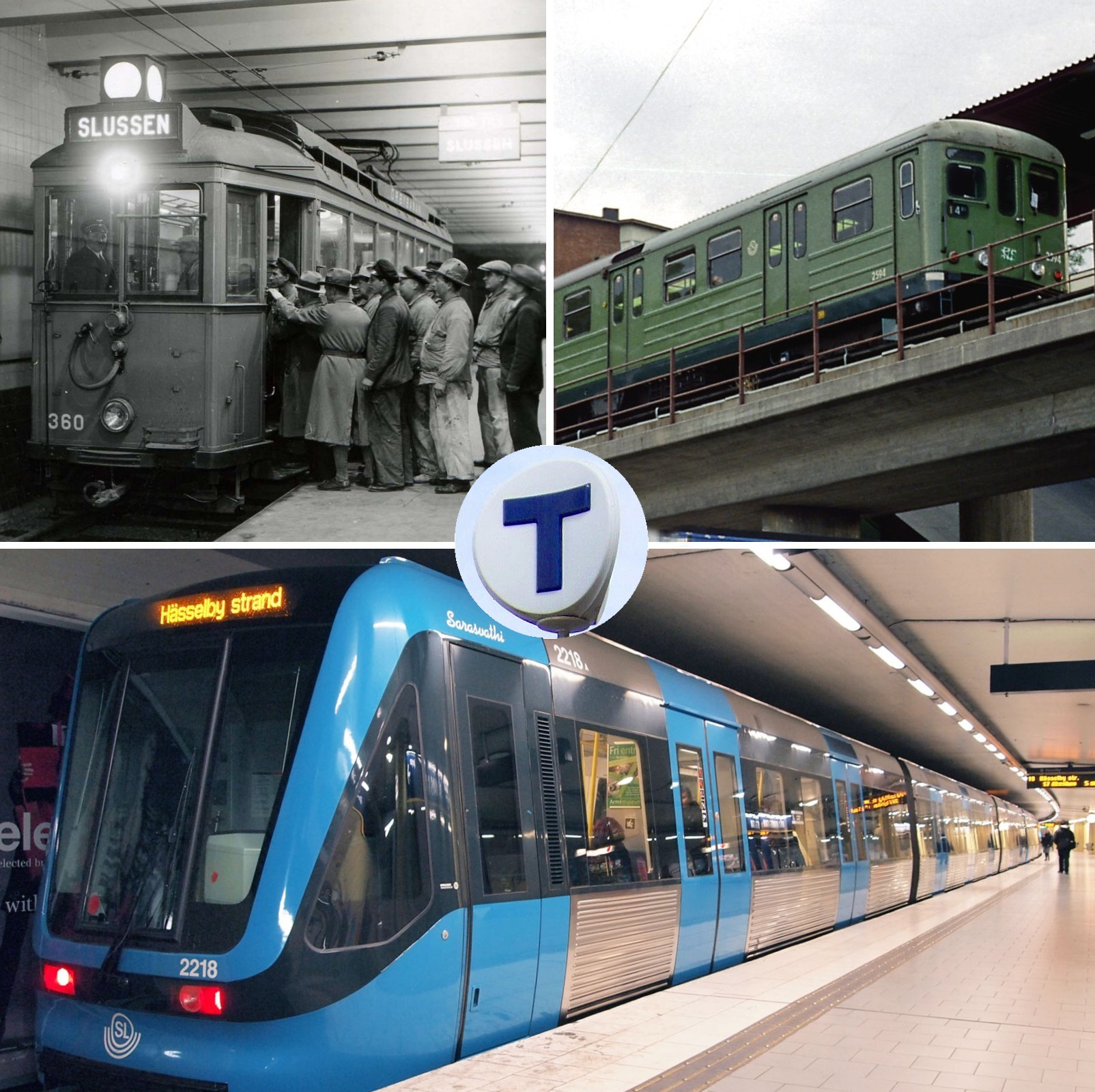 Stockholms tunnelbana kollage skapad av user:Holger.Ellgaard